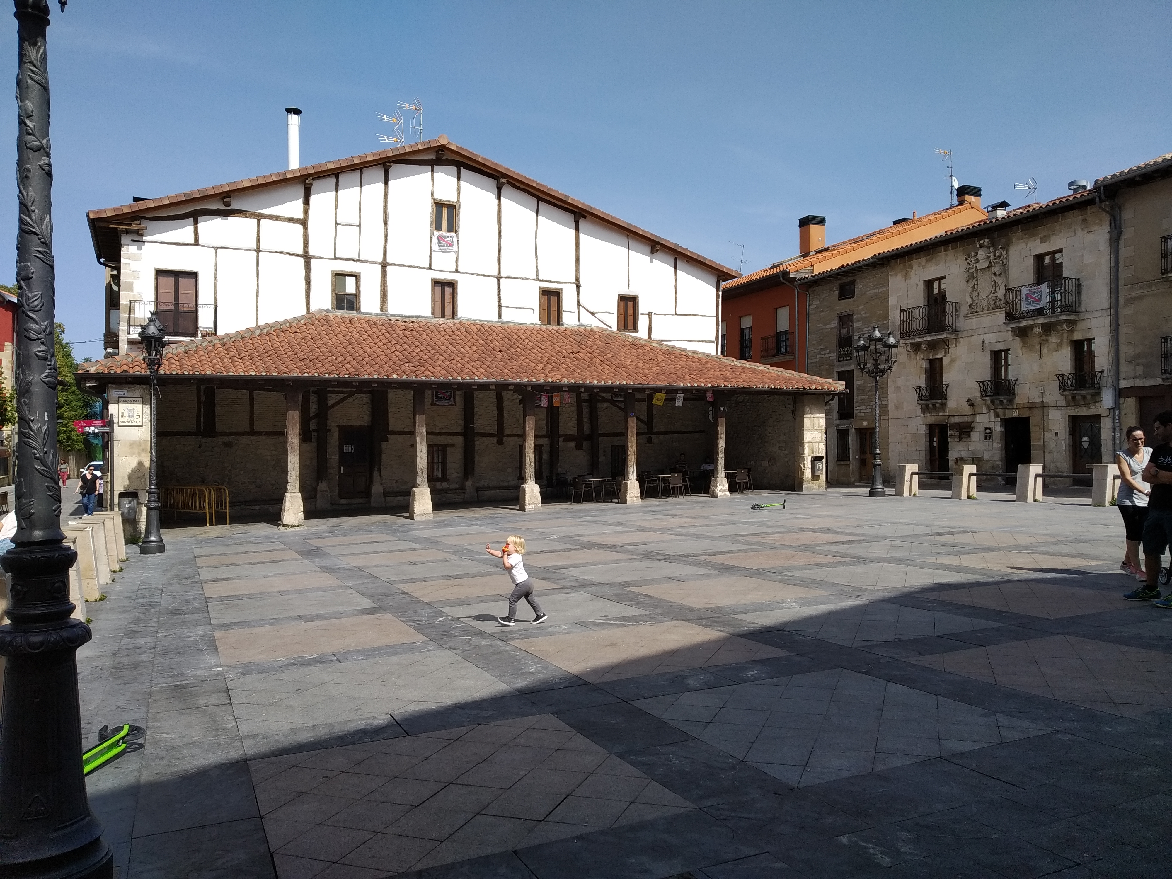 Agurain